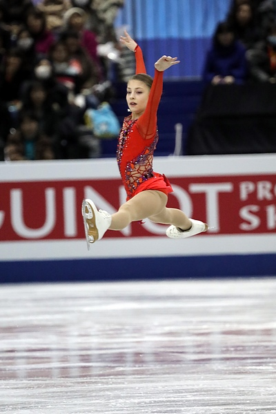 Алёна Косторная (Россия) на финале юниорского Гран-при 2017-2018